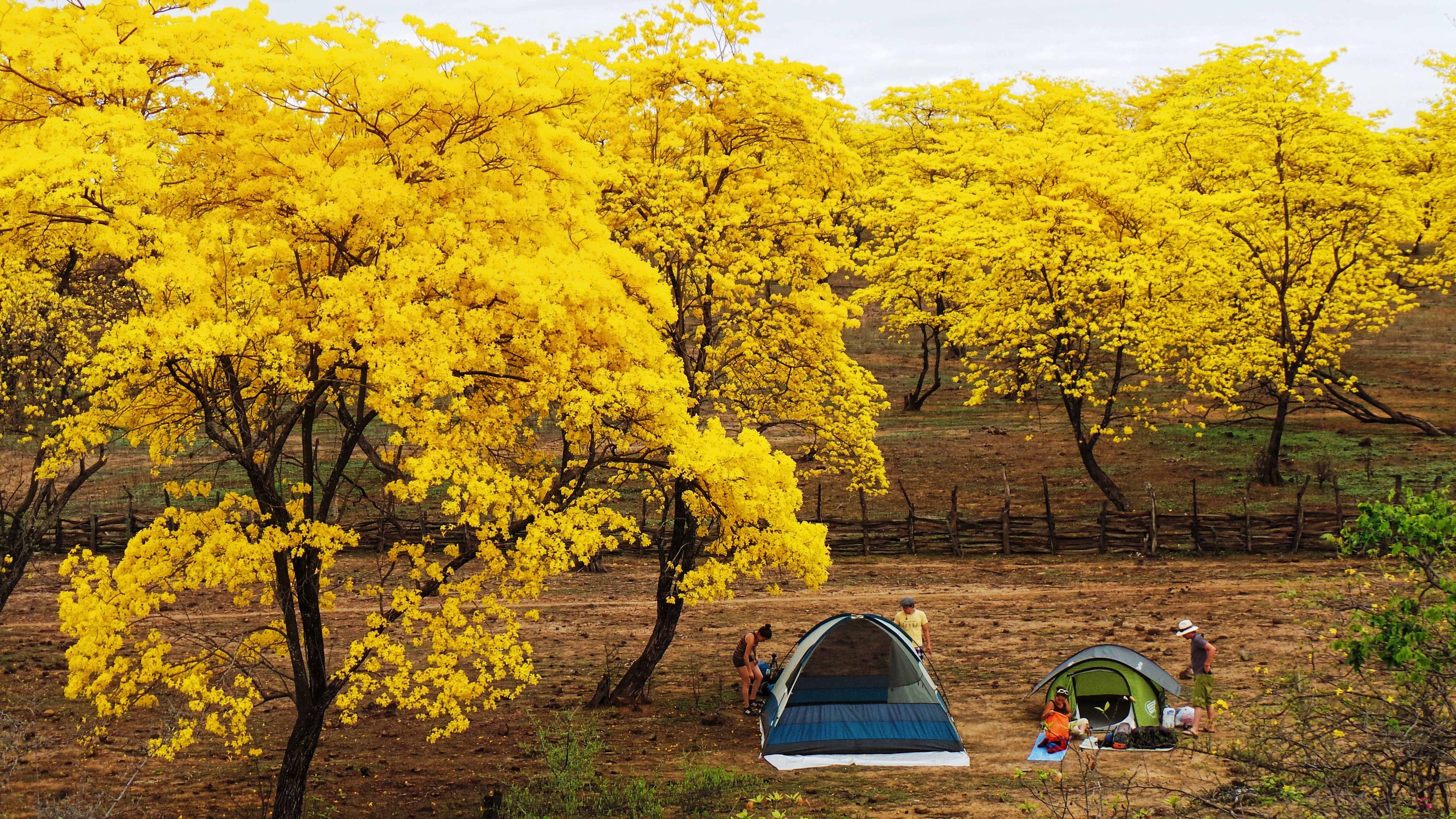 Mangahurco